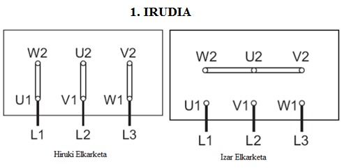 Harildu konbinazioak